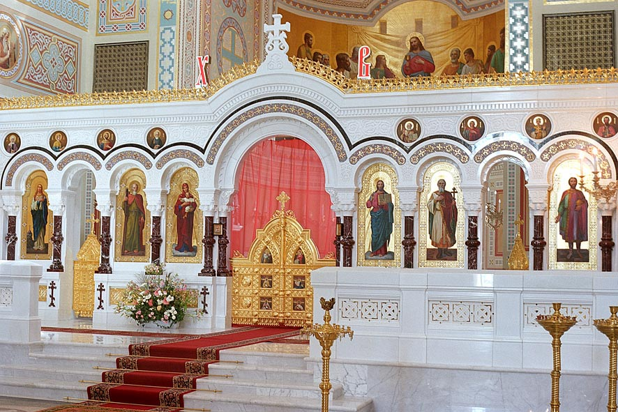 Владимирский собор в Херсонесе. Центральный иконостас. Фото с сайта художников